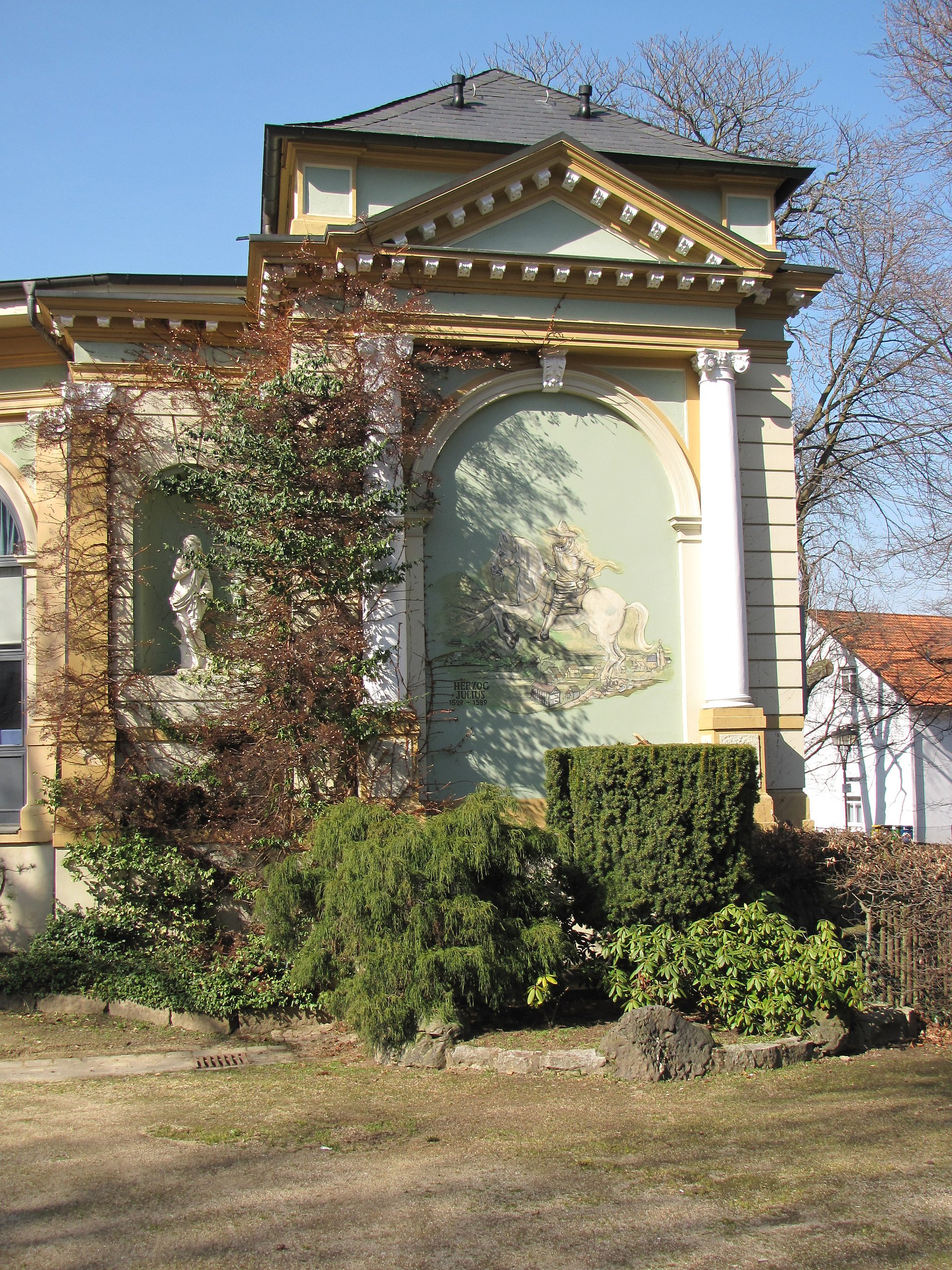 Gemälde von Herzog Julius zu Braunschweig-Wolfenbüttel auf der Außenmauer der Trink- und Wandelhalle von Bad Harzburg